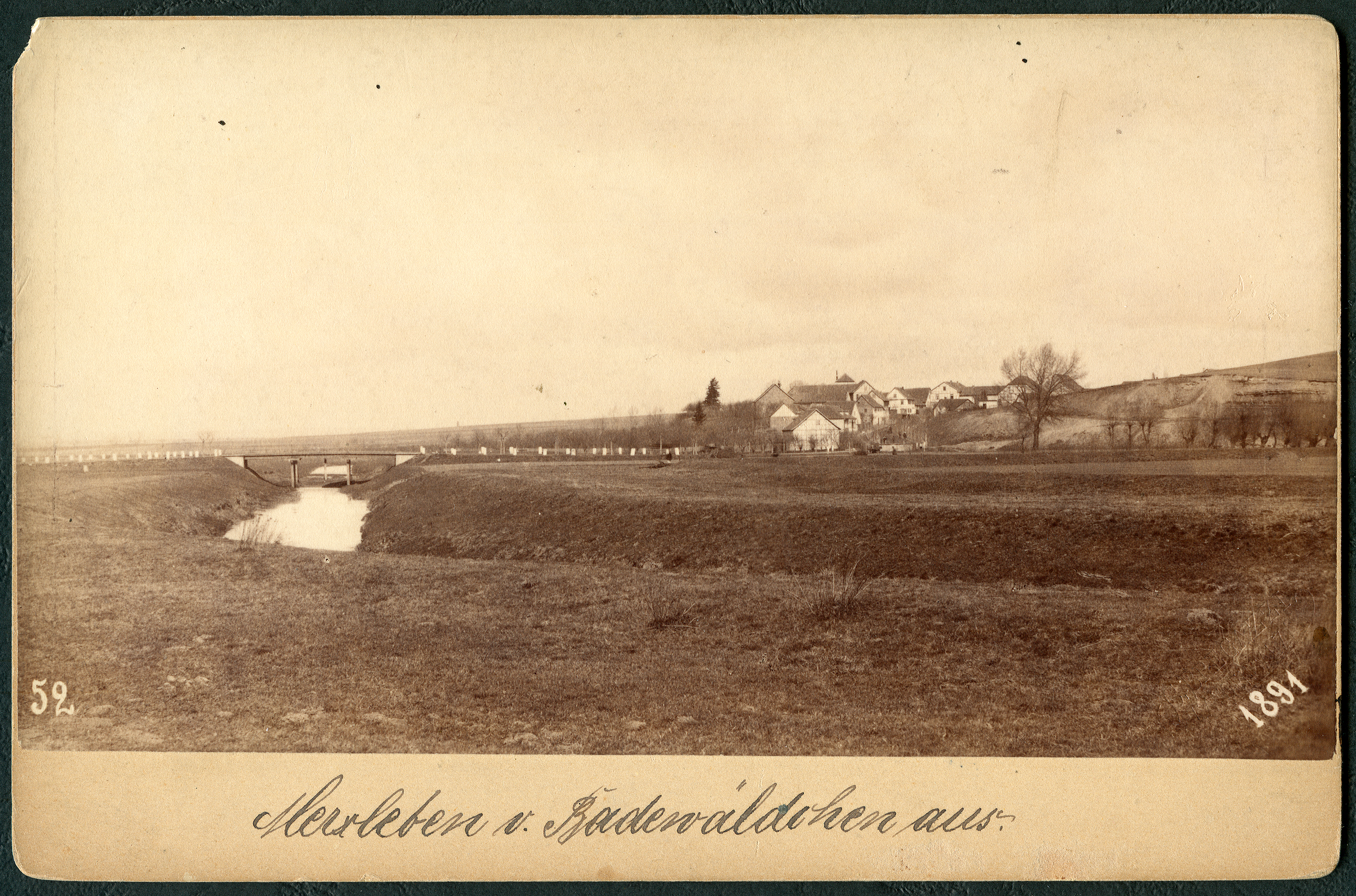 Auf Fotokarton aufgezogene Aufnahme im Kabinettformat mit der fortlaufenden Nummer 52 und der - handschriftlichen - Untertitelung „Merxleben v. Badewäldchen aus.“ Das Foto zeigt einen Blick über die Ufer der Unstrut, die im Hintergrund links durch eine Straßenbrücke verbunden sind. Rechts der Bildmitte das Örtchen Merxleben mit seinen Fachwerkhäusern. Am rechten Bildrand ist durch die unbelaubten Bäume der Steinbruch gut zu erkennen. Am rechten Bildrand unten findet sich unter dem Blindstempel "C. Bregazzi, Langensalza die wohl schon auf der Glasplatte per Handschrift vorgefertigte Jahreszahl 1891 ...